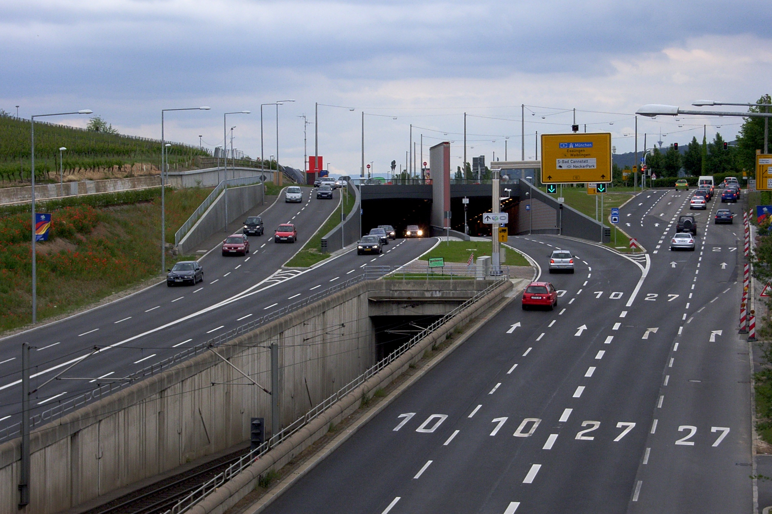 Stuttgart, Pragsatteltunnel (Ursprüngliche Datei wurde bearbeitet. Horizont begradigt, Bild ausgeschnitten und Kontrast erhöht.)